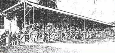 Estádio Leônidas Sodré de Castro, em Belém do Pará. Primeira arquibancada do Estádio Leônidas Castro, a Curuzú. A arquibancada foi inaugurada a 16 de abril de 1916